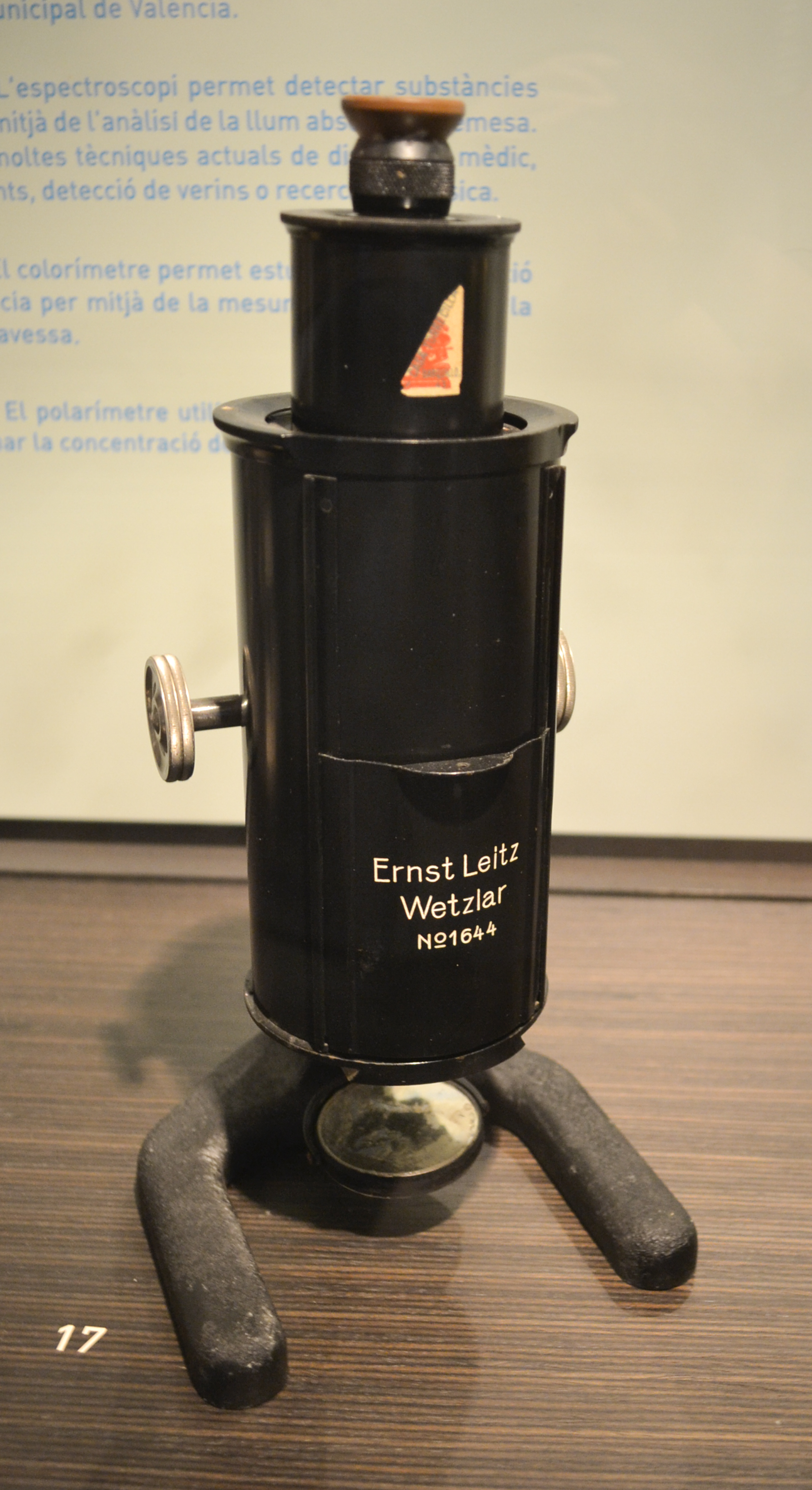 Colorímetro de Ernst Leitz, colección científico-médica de la Universidad de Valencia, palacio de Cerveró, c. 1940-1950